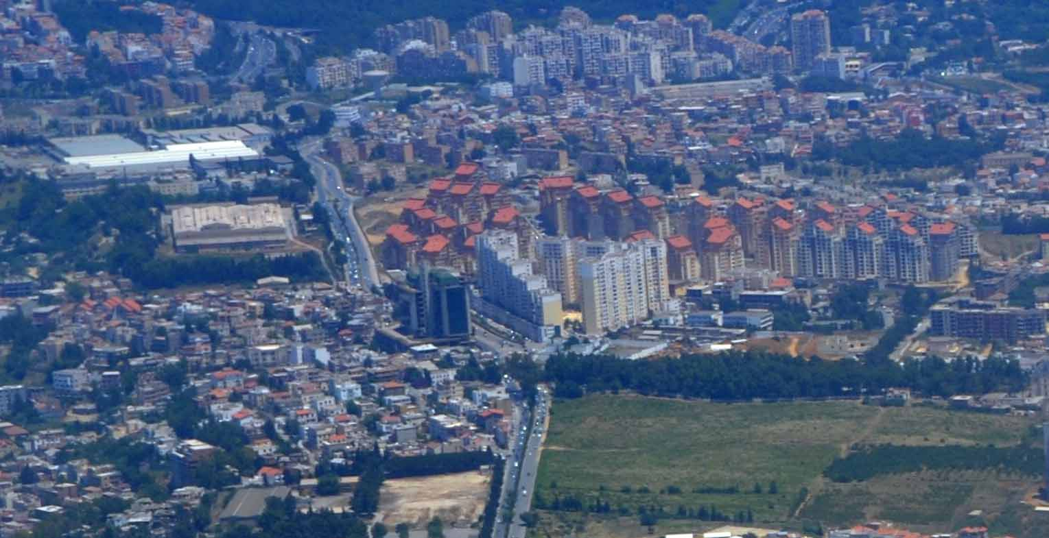 Vue aérienne de la commune d'El Achour, le 26 juin 2013